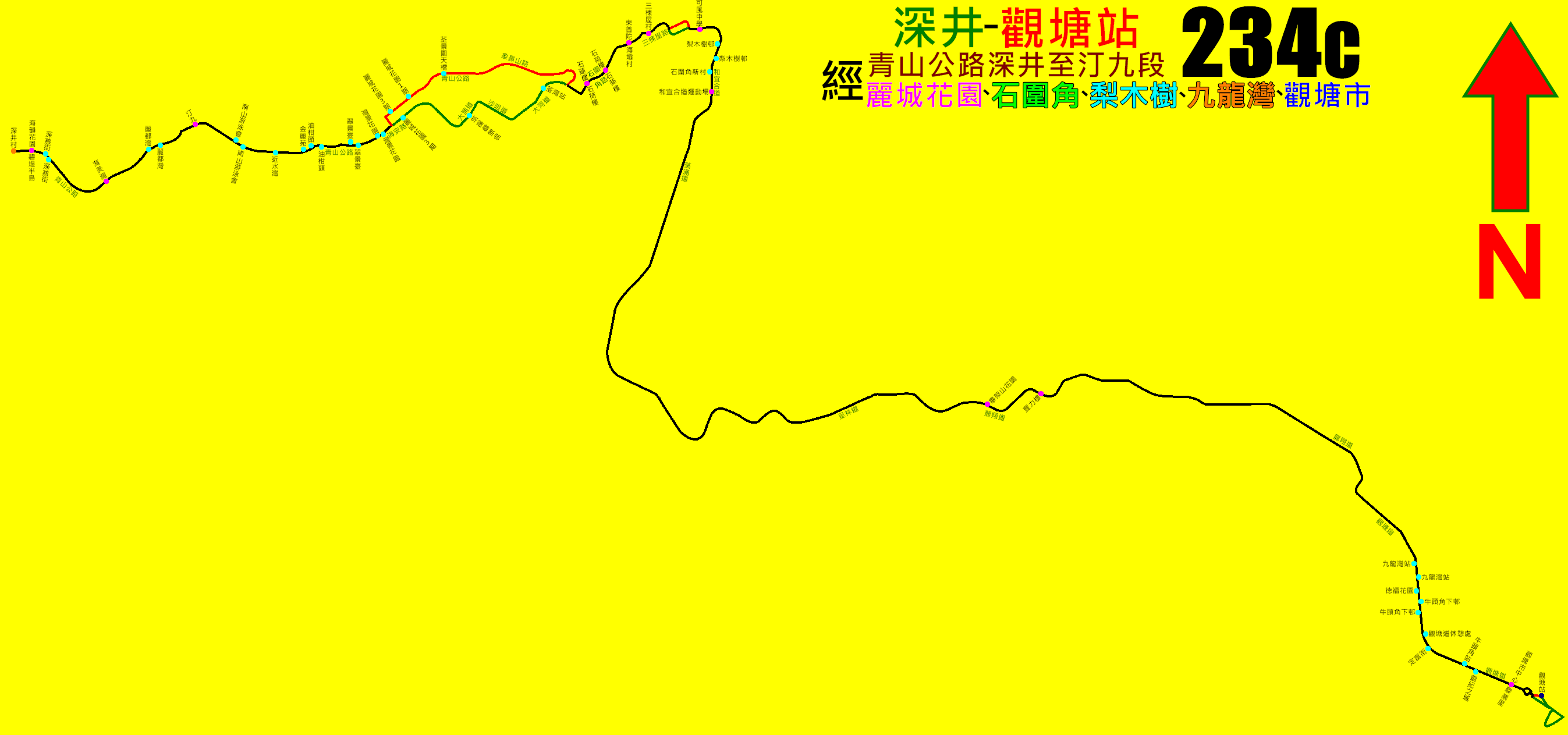 中文（香港）: 九巴234C線的走線圖